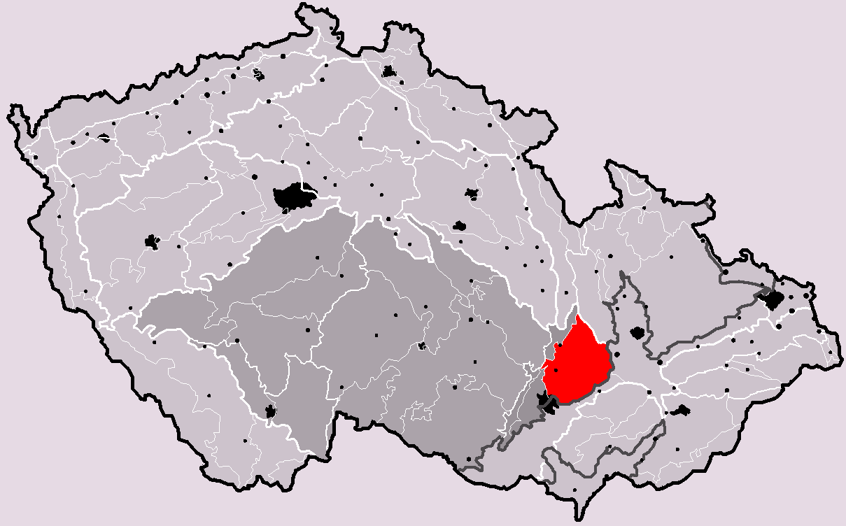 Poloha geomorfologického celku Drahanská vrchovina v rámci České republiky. Hercynský systém Hercynská pohoří I Česká vysočina I2 (II) Česko-moravská subprovincie I2D (IID) Brněnská vrchovina I2D-3 (IID-3) Drahanská vrchovina